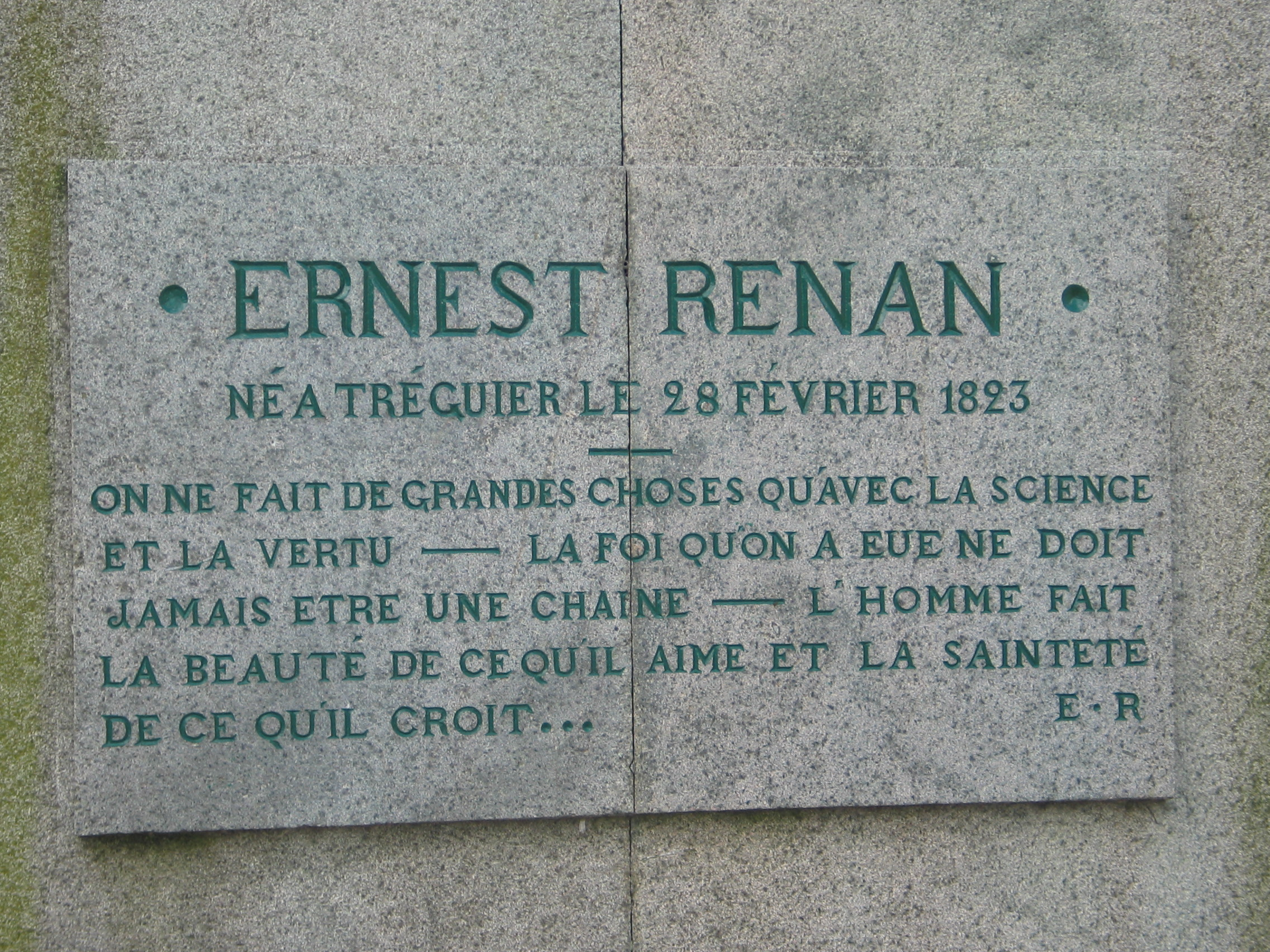 Plaque du monument dédié à Ernest Renan sur la place principale de Tréguier (Bretagne).